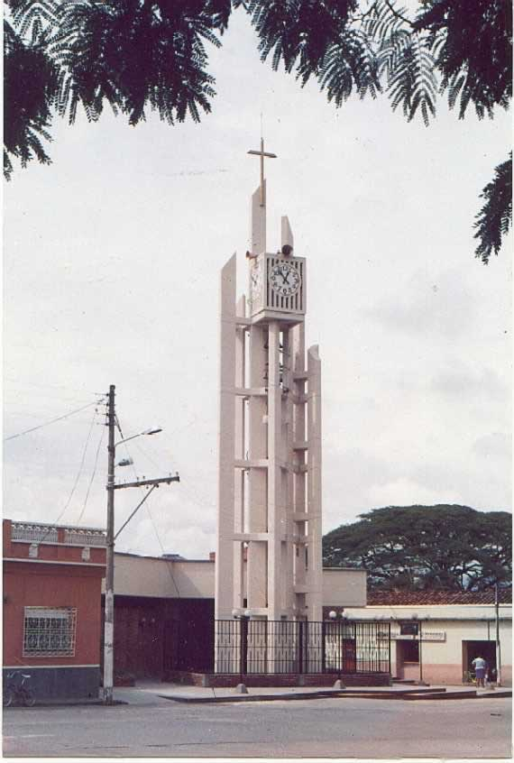 Imagen de la iglesia de La Victoria, Valle del Cauca